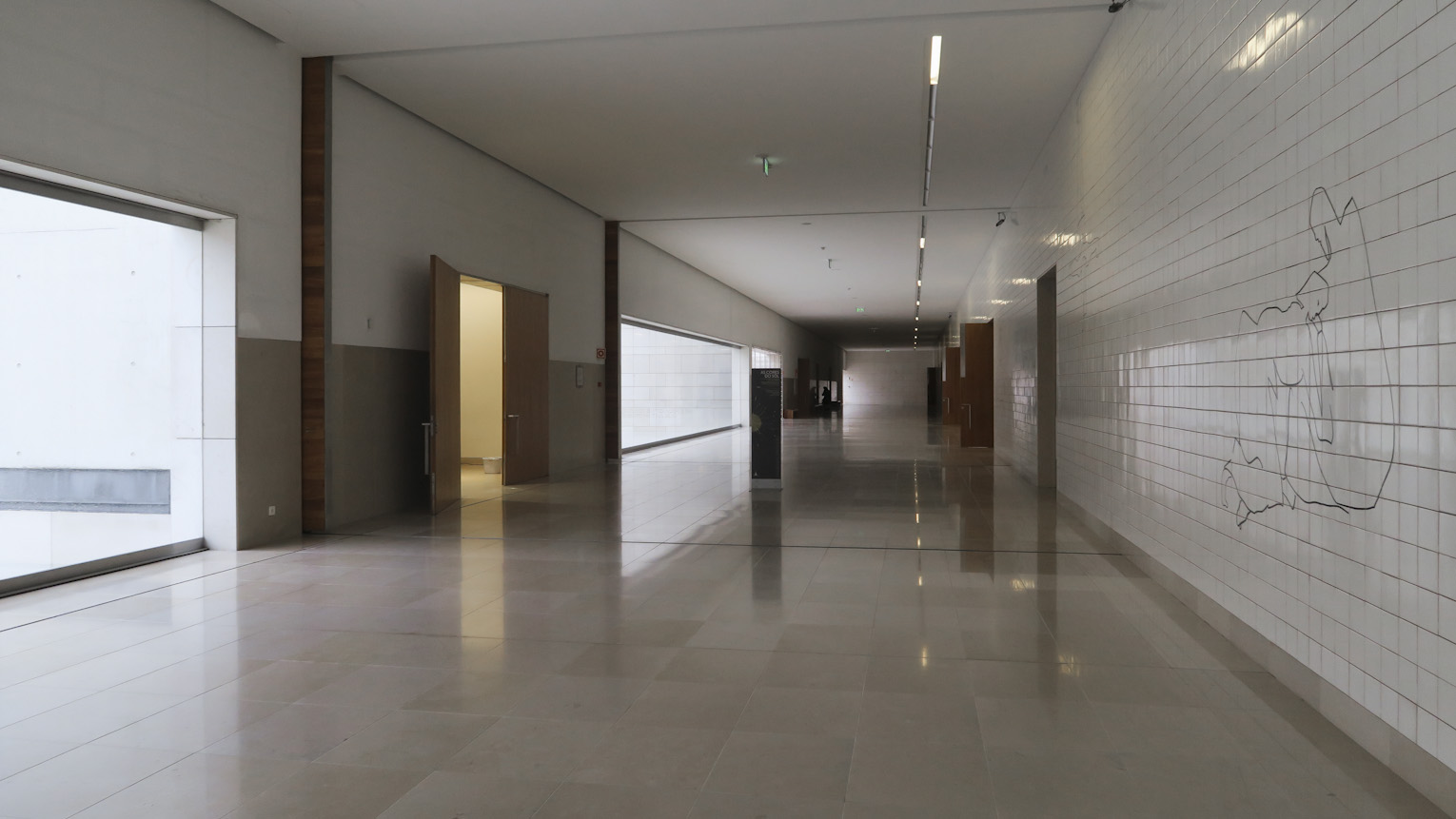 Galilé dos Apóstolos São Pedro e São Paulo, Santuário de Fátima